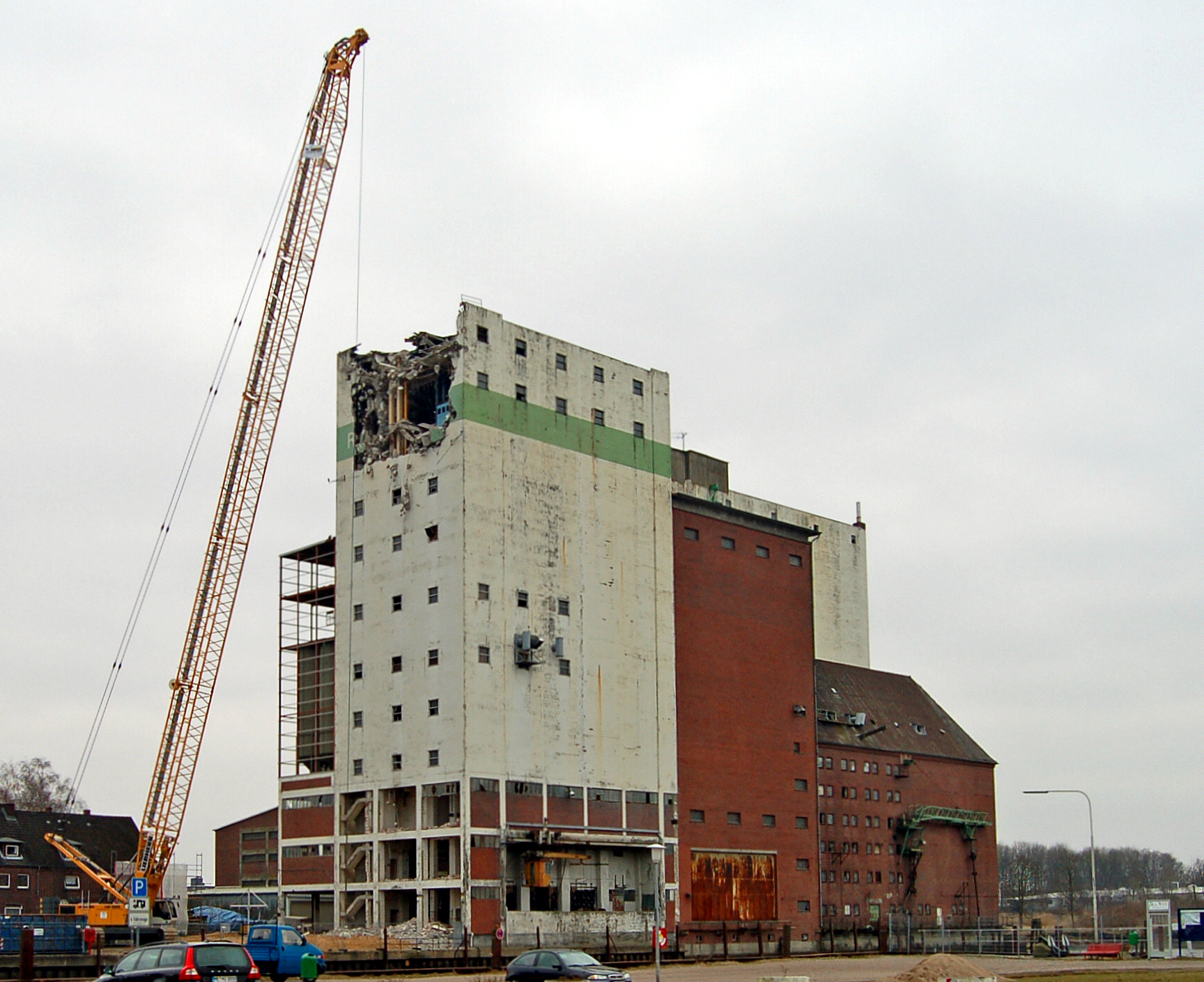 Der Raiffeisen Silo in Uetersen am 10.03.2011. Der größte Seilbagger Europas (280 Tonnen, ca. 85 Meter hoch) hat seine Arbeit aufgenommen.